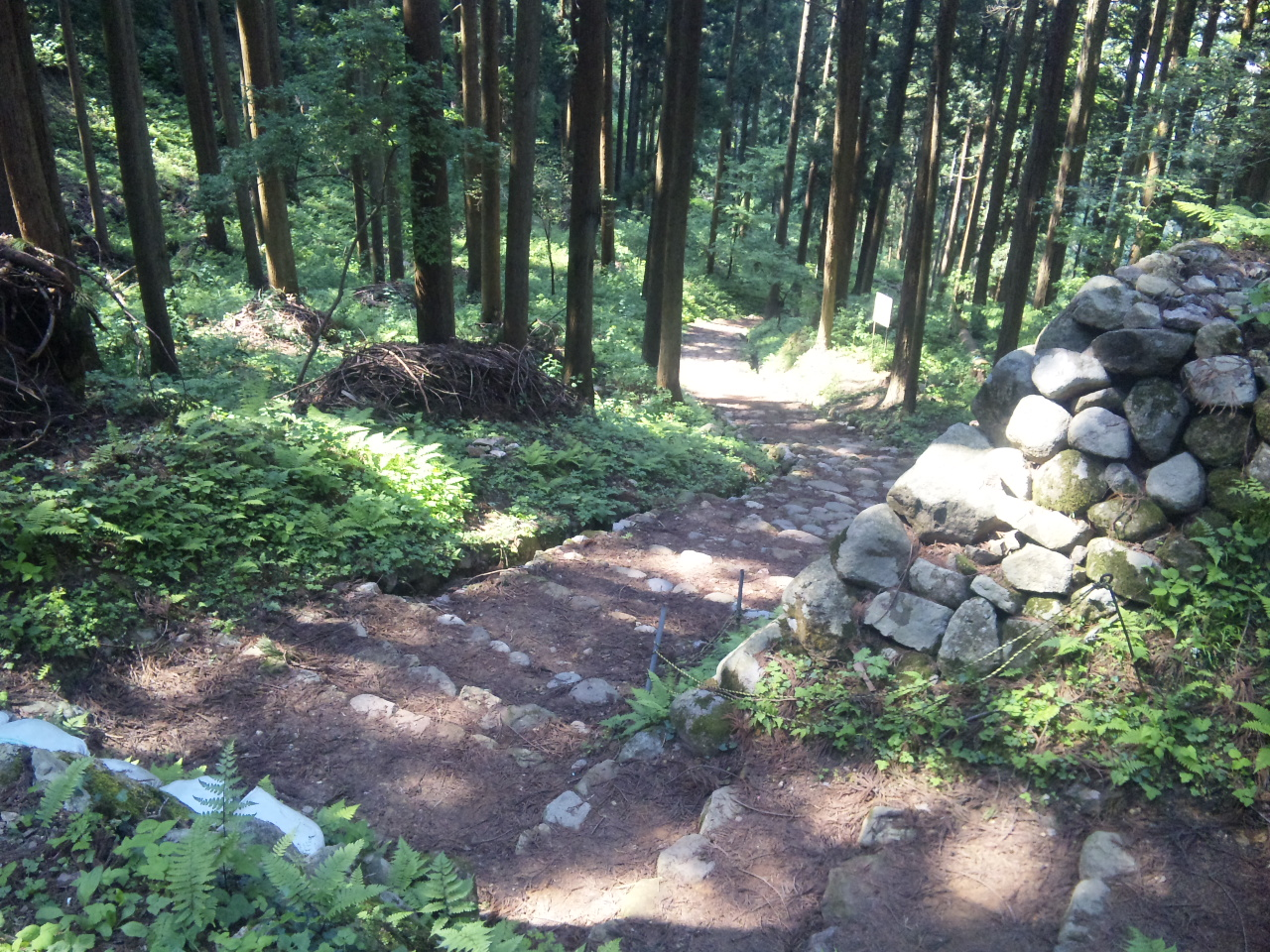 七尾城古道